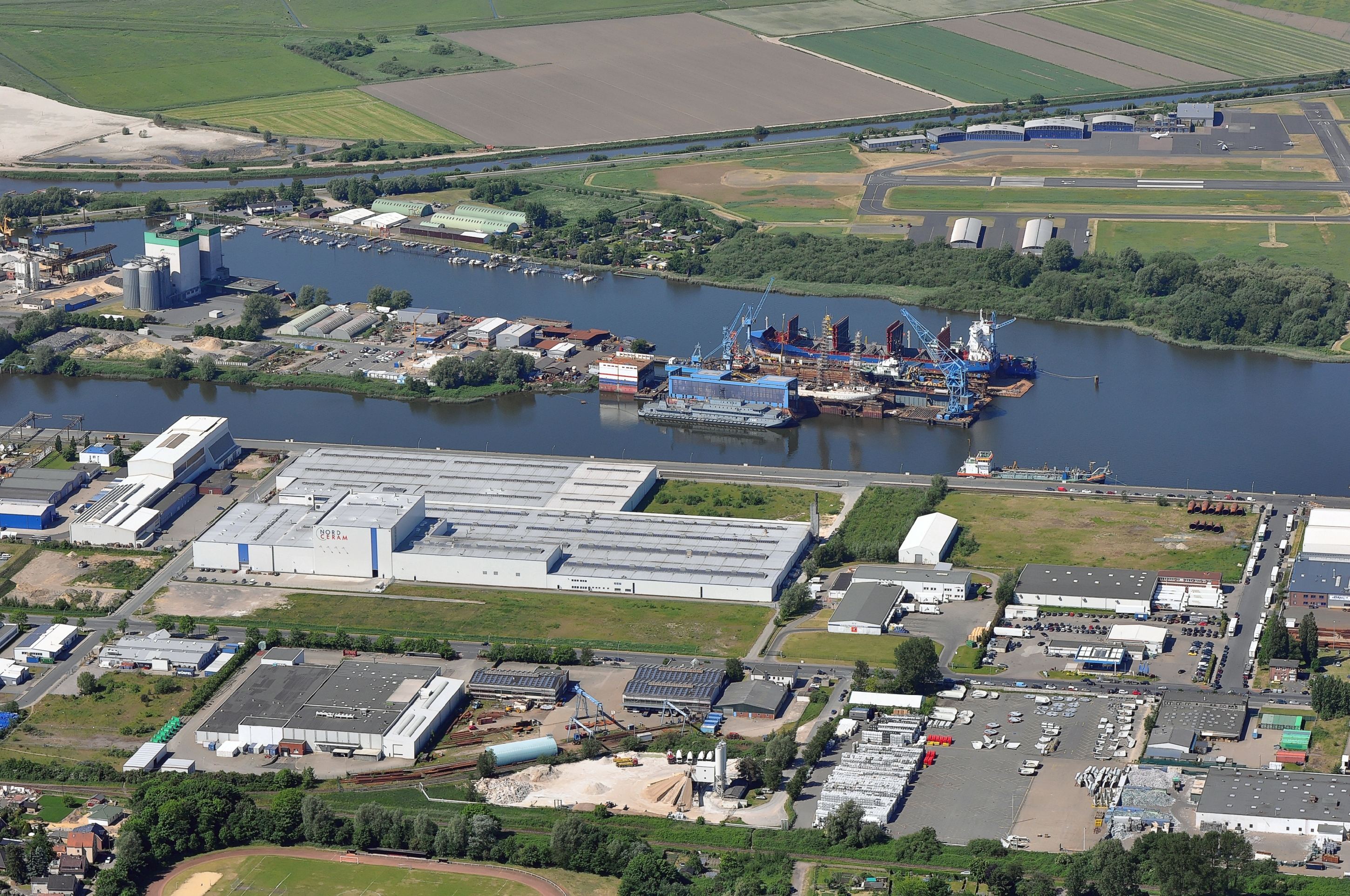 Luftbilder von der Nordseeküste 2012-05: Bremerhaven